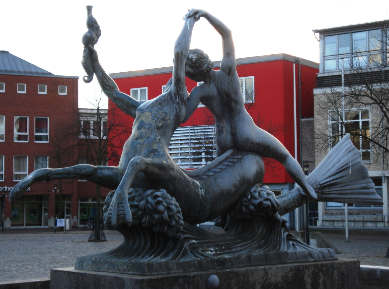 Brunnenplastik "Im Spiel der Wellen"